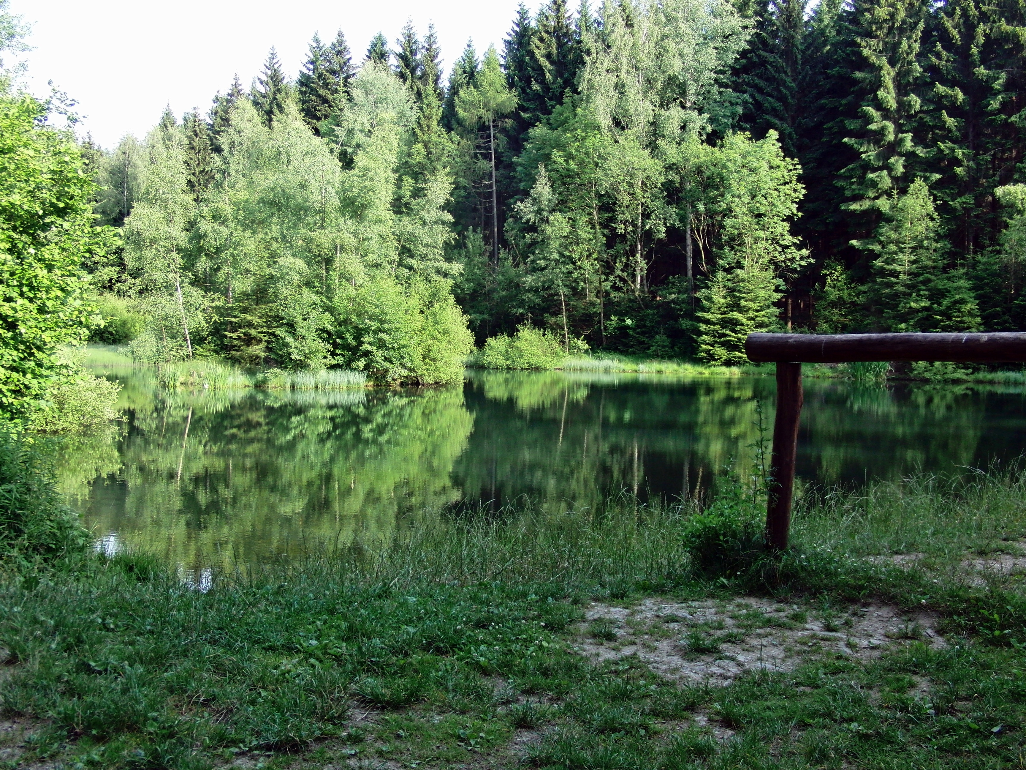 Christelgrund, Insel